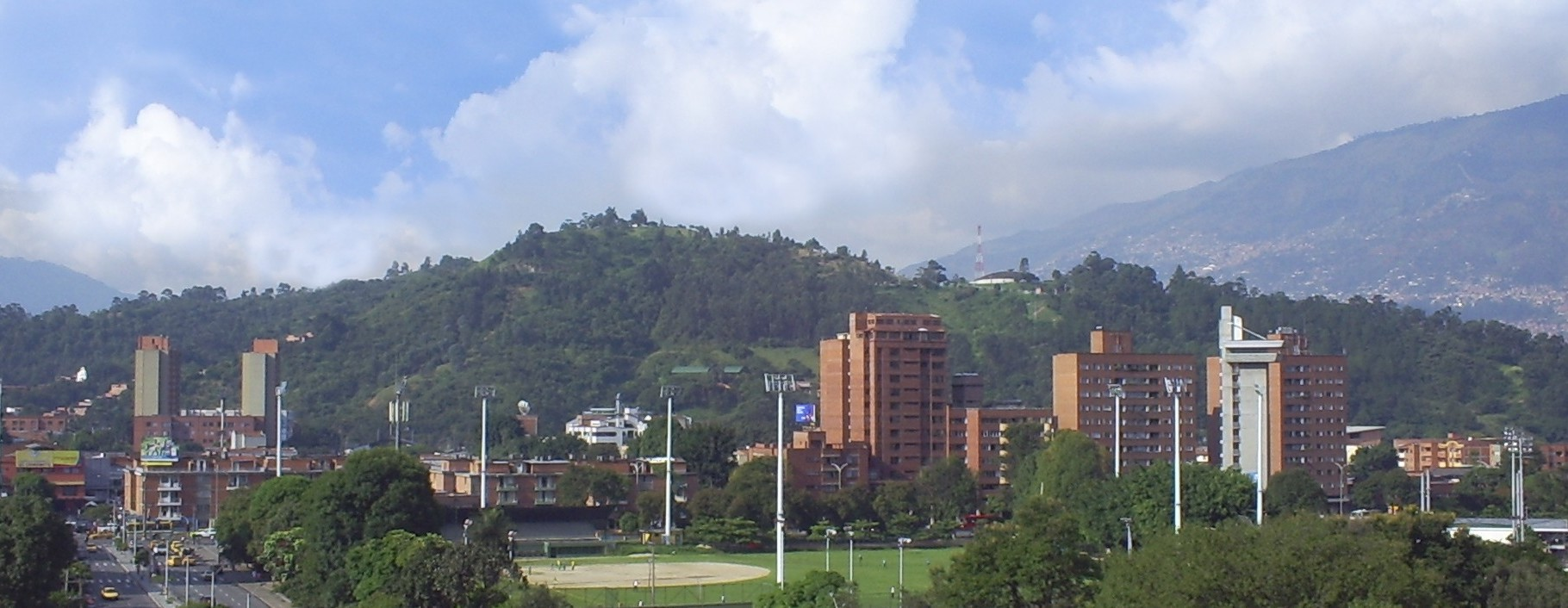 Ecoparque Cerro El volador, Medellín, Colombia